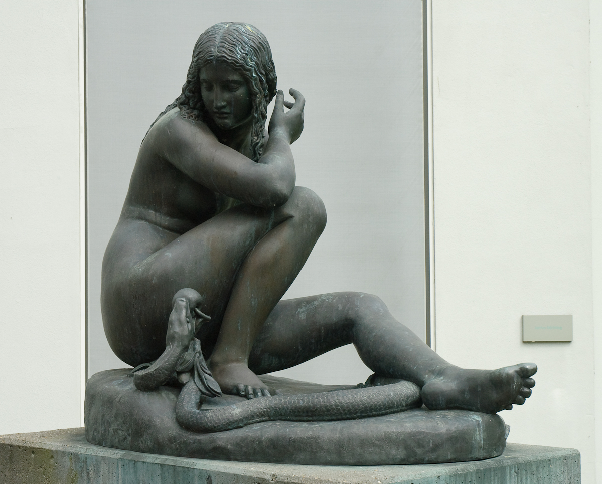 Johannes Antonius van der Ven, Eva in bekoring, 1987 'Eva in bekoring', van Johannes Antonius van der Ven, 1987. Beeldentuin Noordbrabants Museum